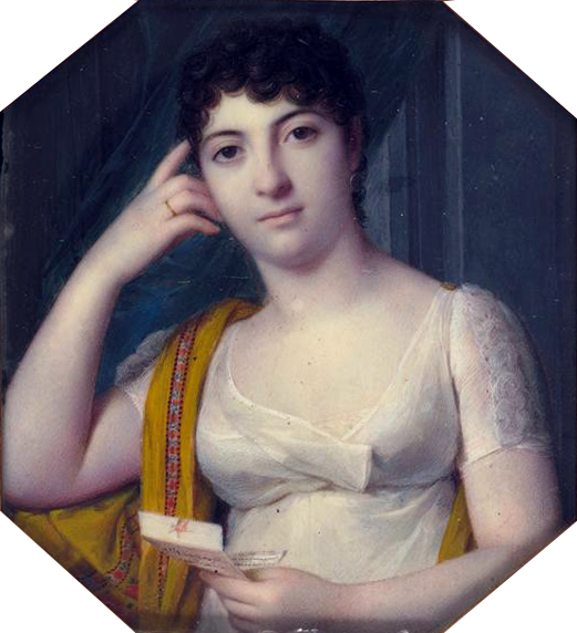 Portrait of Mademoiselle George, Rueil-Malmaison Museum, Charvet donation.